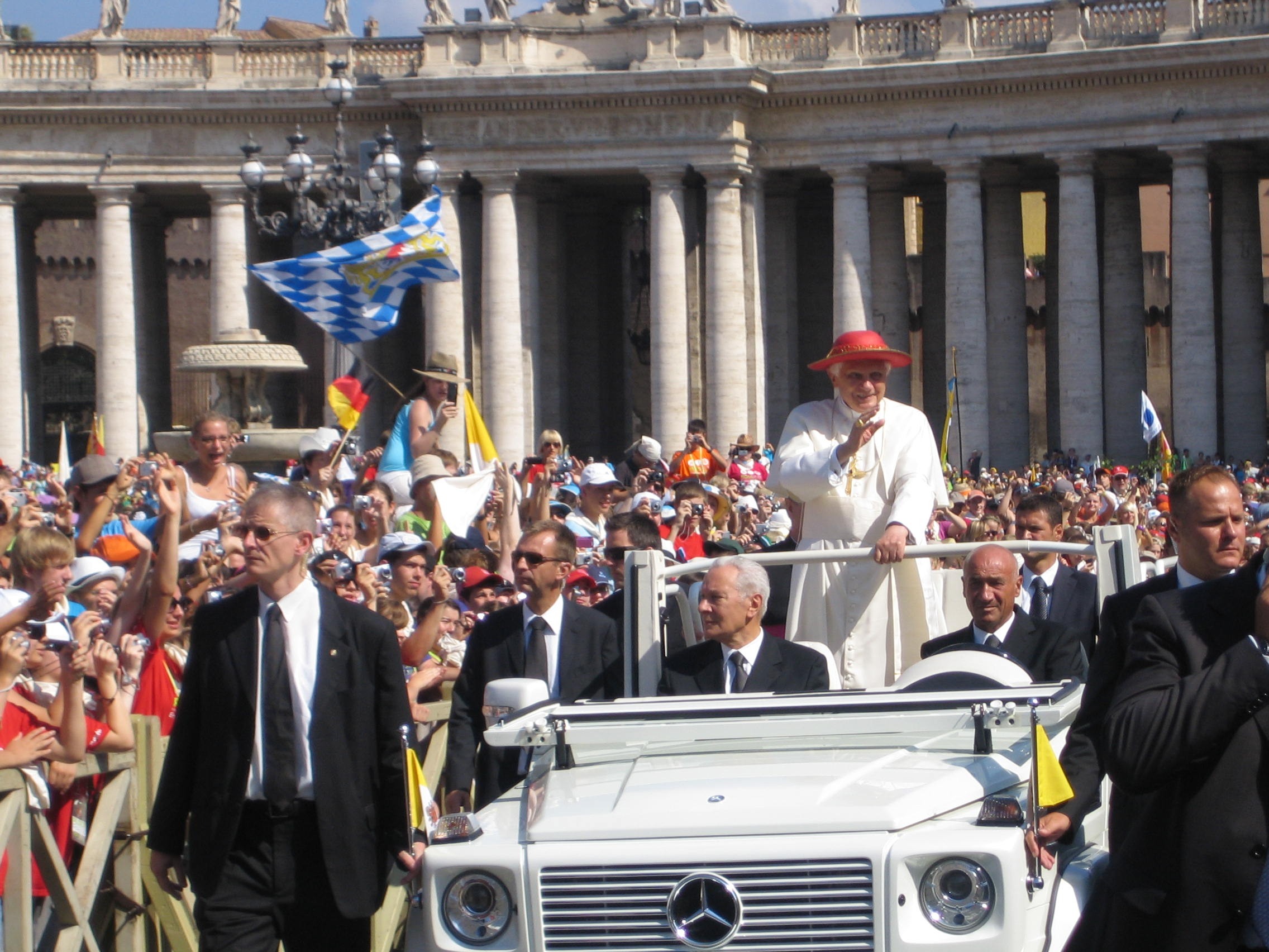 Papst Benedikt XVI. bei der Generalaudienz anlässlich der internationalen Ministrantenwallfahrt 2010 in Rom